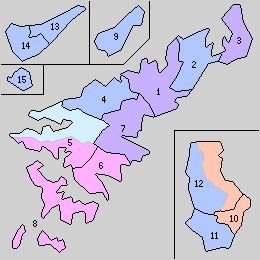 鹿児島県大島郡の島嶼町村制時点の町村（十島村を除く）